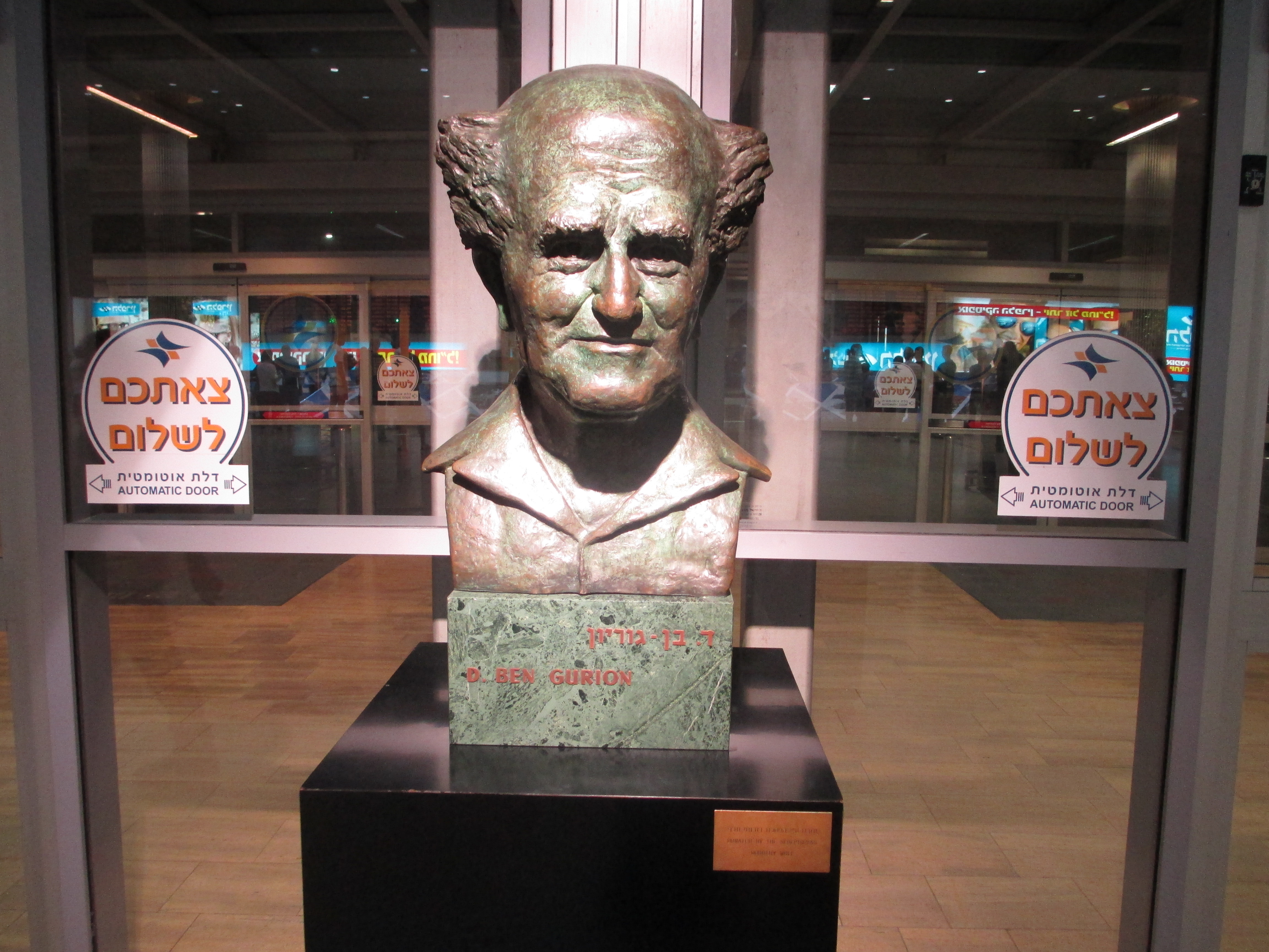 פסל בן גוריון בנתב"ג